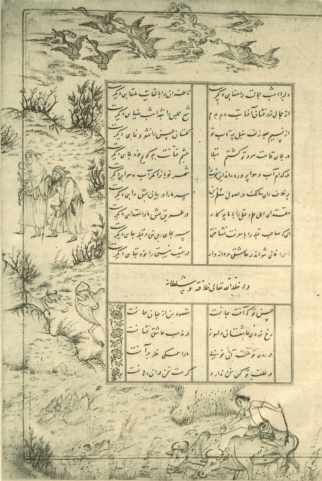 Abd_al_Hayi_Диван_Ахмада_Джалаира